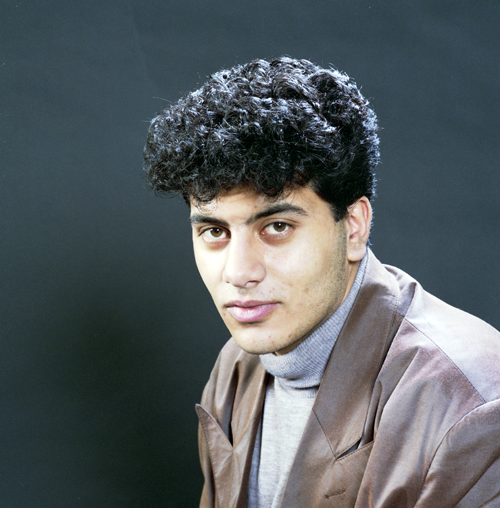 Kehaf Allush in 1988